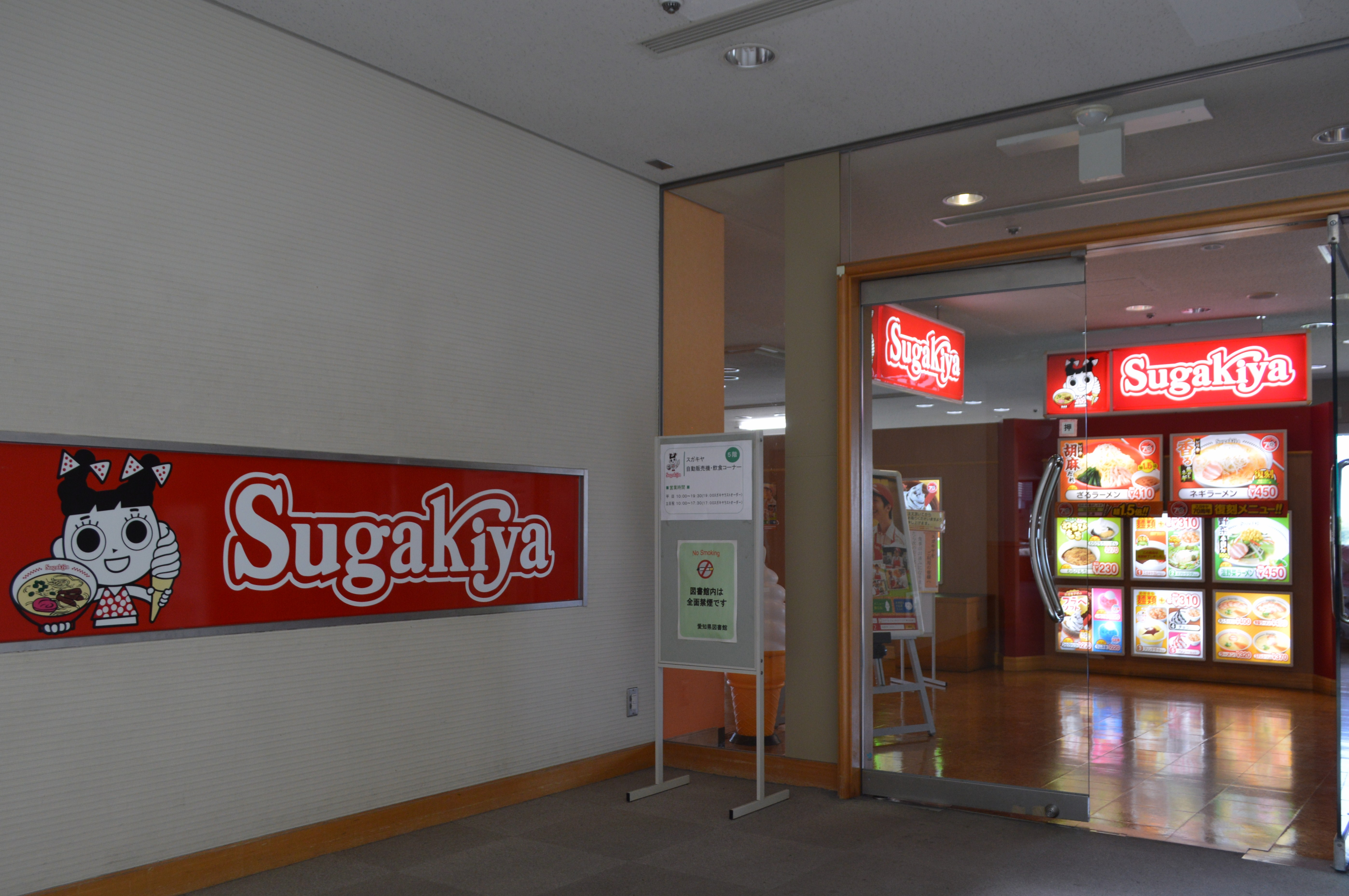 愛知県図書館5階のスガキヤ。